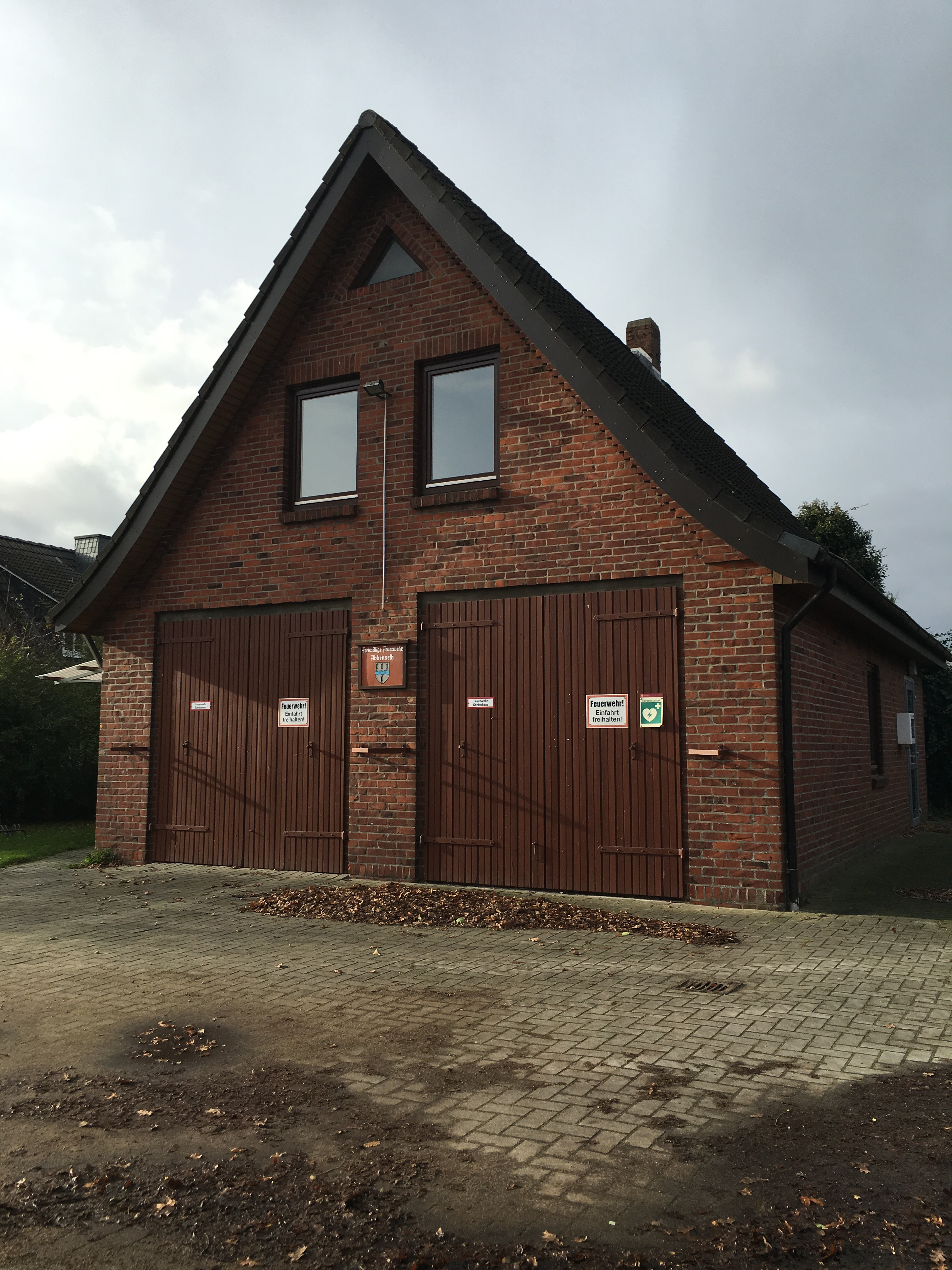 Sprüttenhuus in Abbenseet